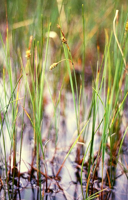 Schlamm-Segge (Carex limosa), Sauergräser (Cyperaceae) - Österreich/Austria/Autriche: Niederösterreich, Oberes Ybbstal, „Auf den Mösern“ SW Neuhaus